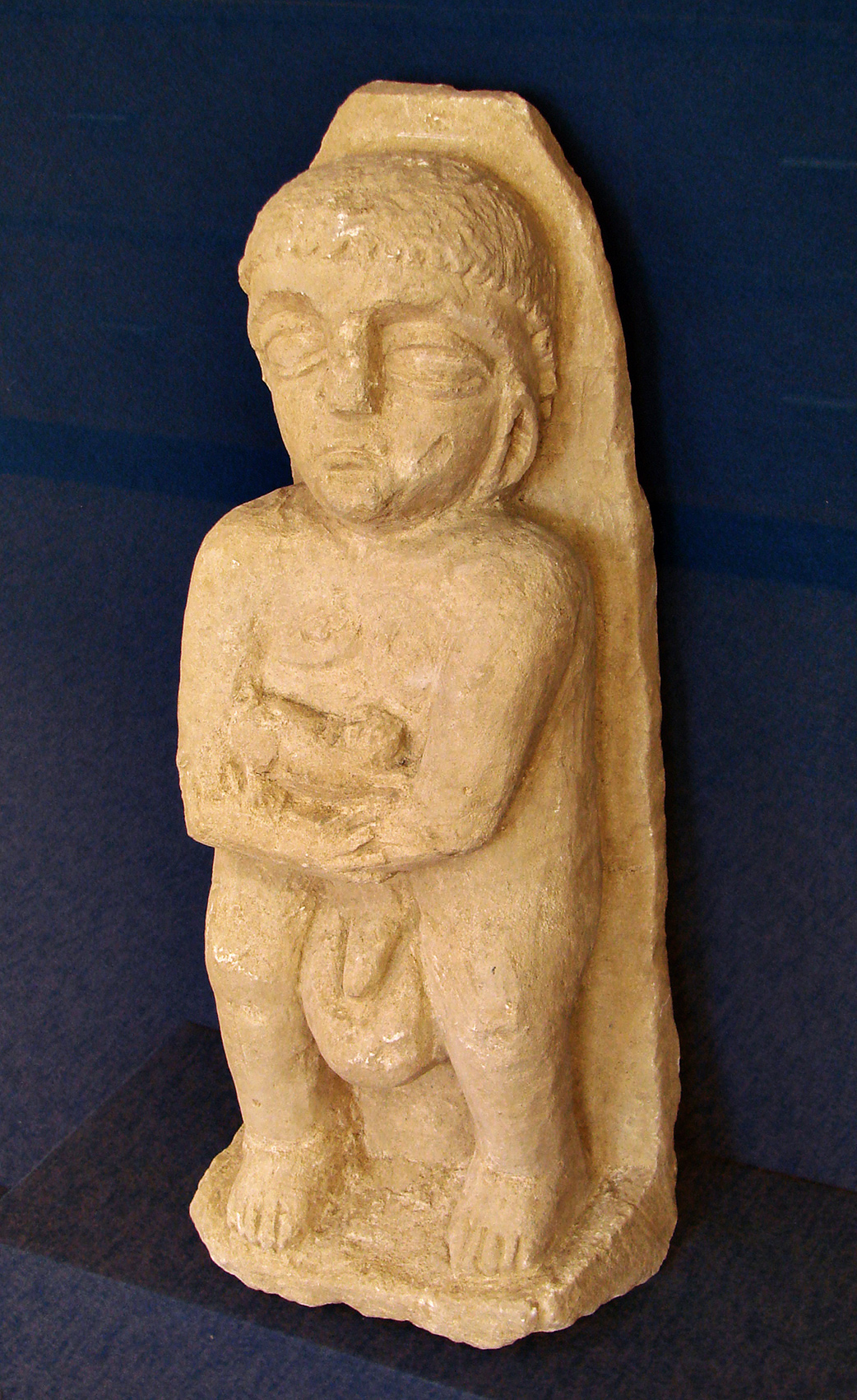 Ex-voto en pierre provenant du sanctuaire gallo-romain de la forêt d'Halatte, près de Senlis: homme tenant un animal. Ce sanctuaire, consacré à une divinité guérisseuse non identifiée, a été bâti vers 50 + JC. On y a retrouvé plus de 350 ex-voto; les ex-voto en pierre étaient à l'origine enduits et peints. Musée de Laon (exposition temporaire du fond du Musée de Senlis).